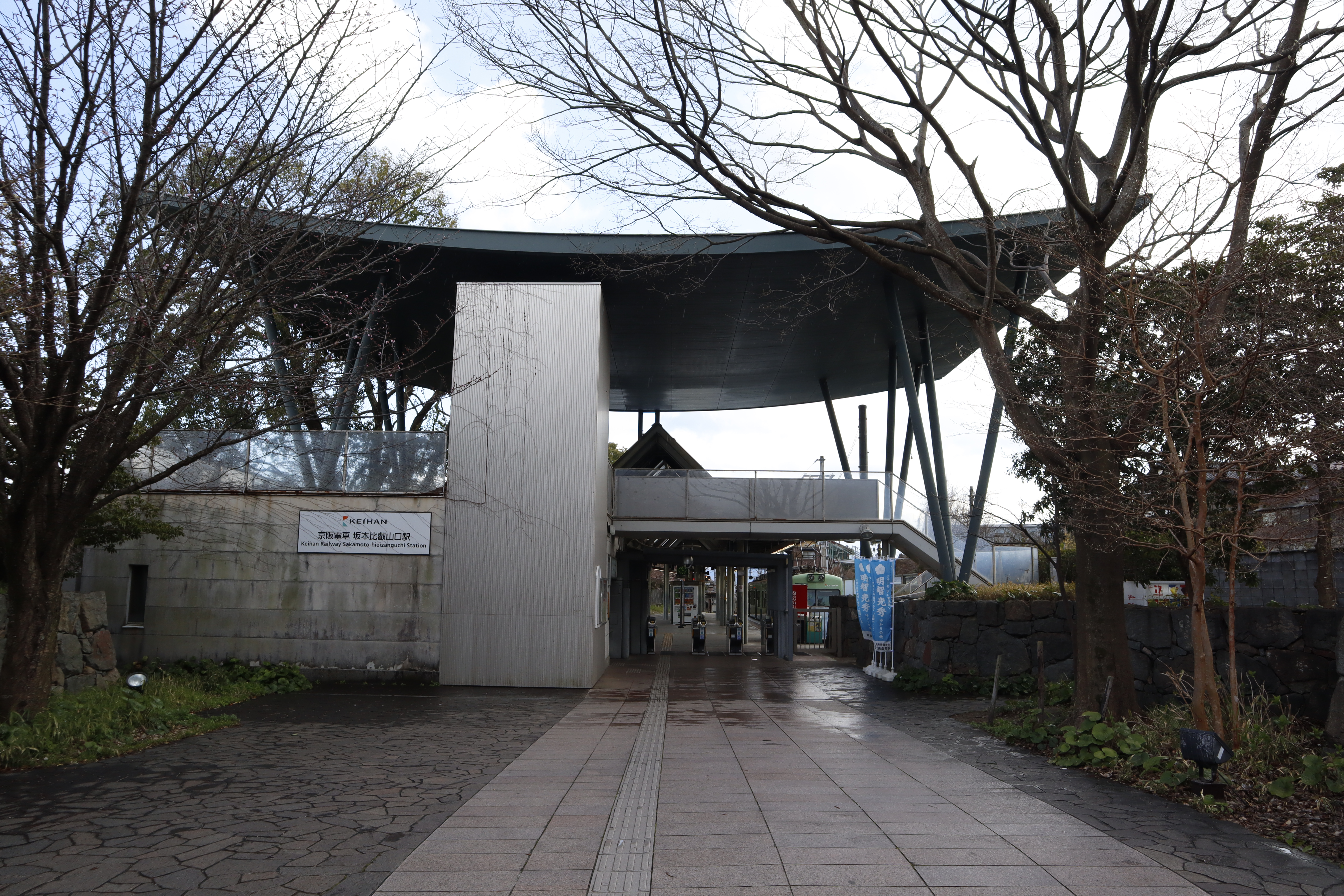 坂本比叡山口駅の駅舎です。